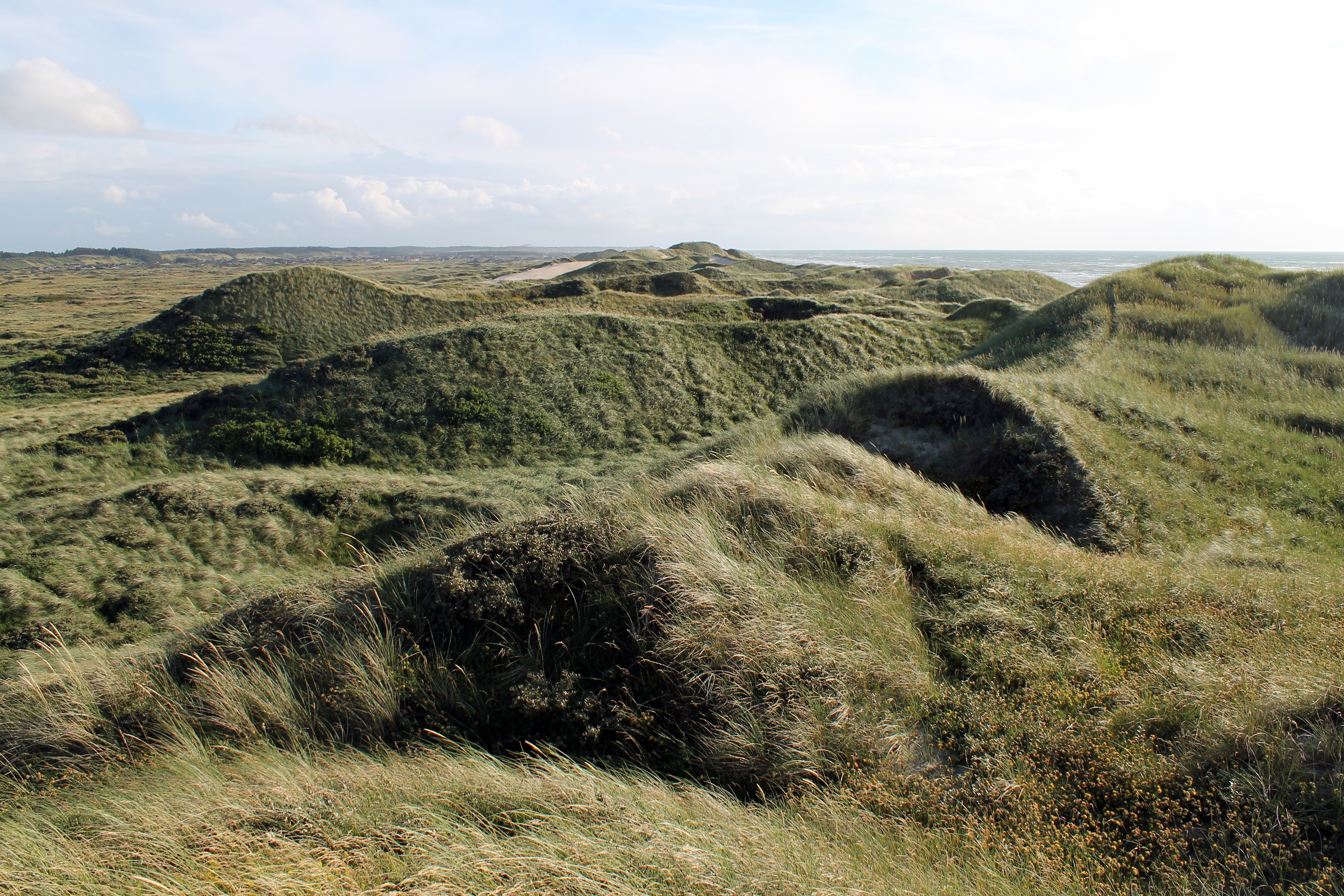 Indlandsklitter ved Kaergaard Strand, Vendsyssel